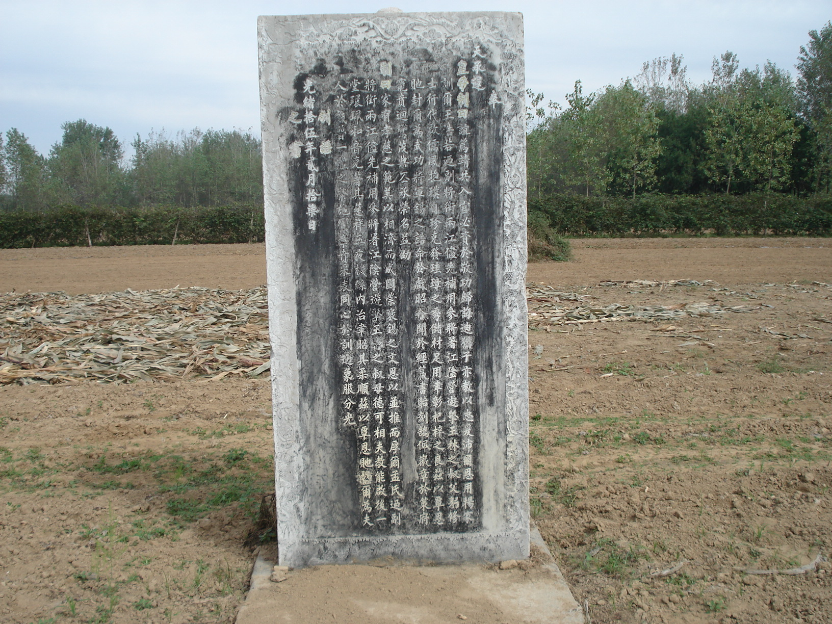 中文（中国大陆）: 清朝皇帝颁布的嘉奖封诰